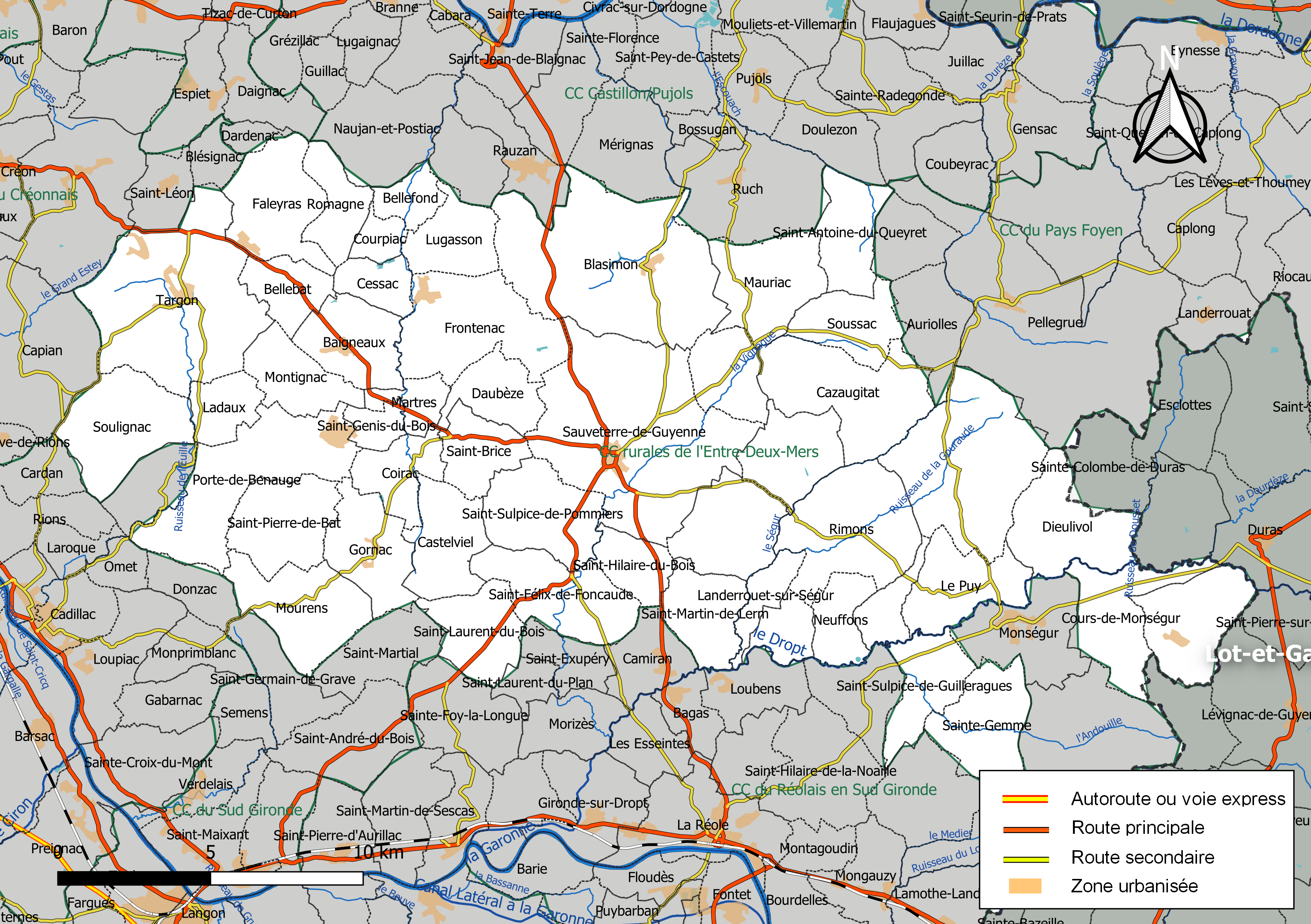 Carte géographique de la Communauté de communes rurales de l'Entre-Deux-Mers, département de la Gironde, France. Composition au 1er janvier 2019.